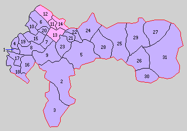 熊本県八代郡の町村制時点の町村。